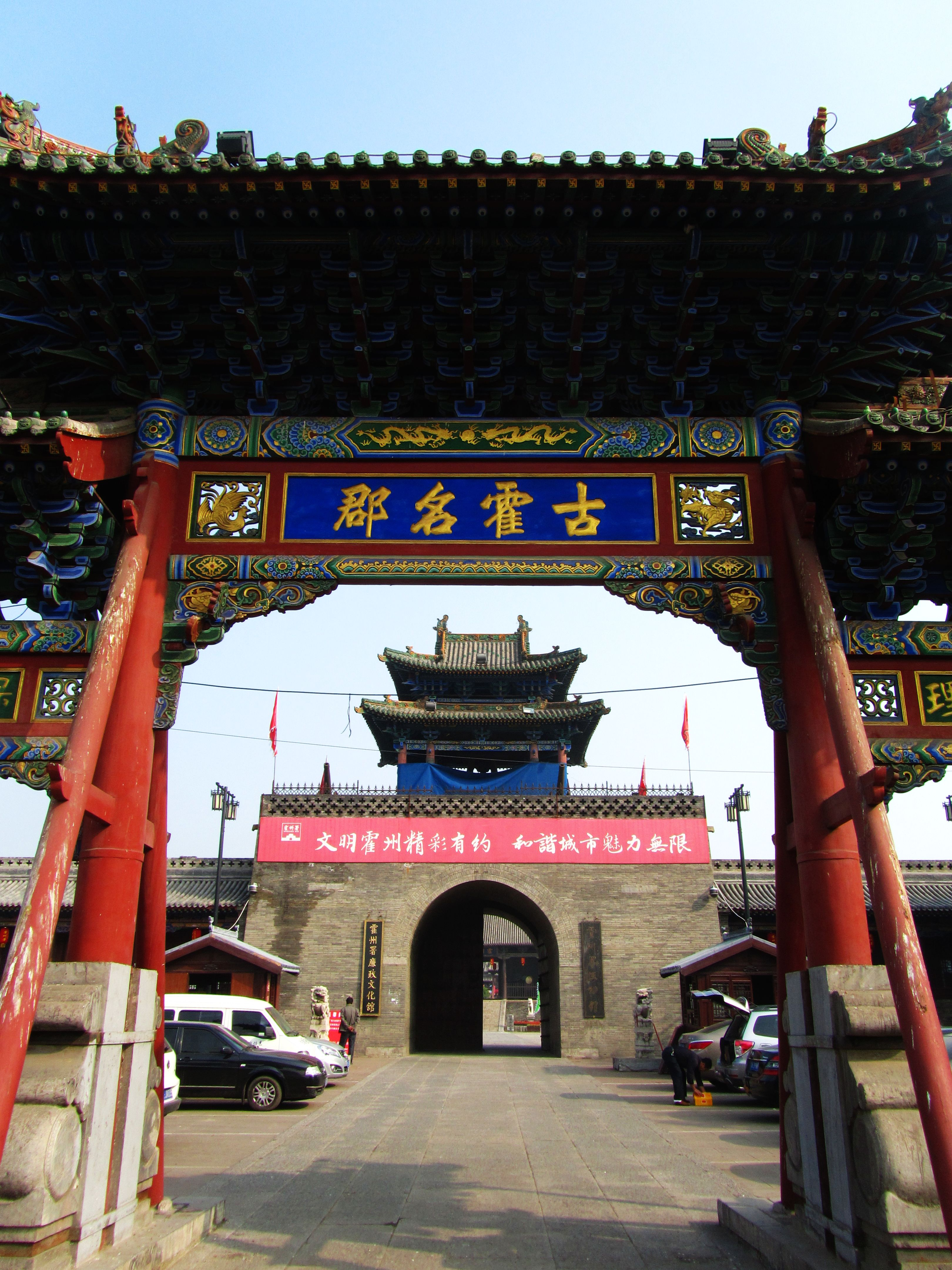 霍州州署，牌坊及谯楼。